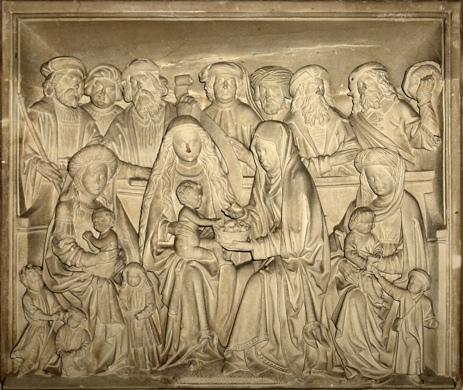 St. Petri Dom Bremen: Relief der Heiligen Sippe im Nordturm-Durchgang. Wahrscheinlich um 1510 von Evert van Roden geschaffen, der sich vermutlich in der mittleren Männerfigur selbst dargestellt hat. (Qu.: Der Dom zu Bremen, ISBN 3-7845-4231-X)